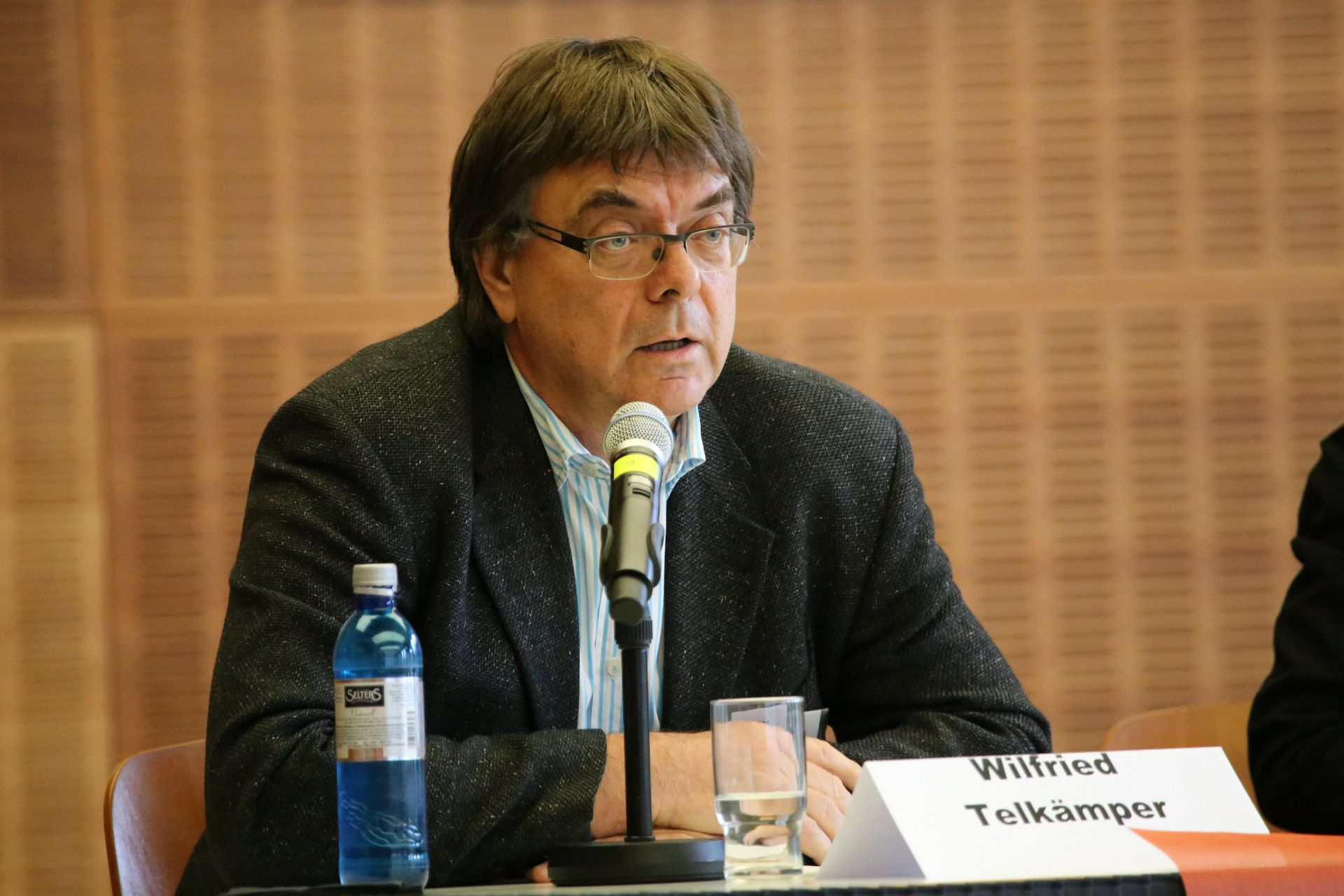 Beyond Aid - 2. Frankfurter Hilfe-Konferenz, 20.-22.2.2014, Wilfried Telkämper